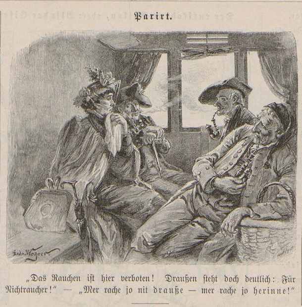 Karikatur auf bayerische Raucher in einem Eisenbahnabteil